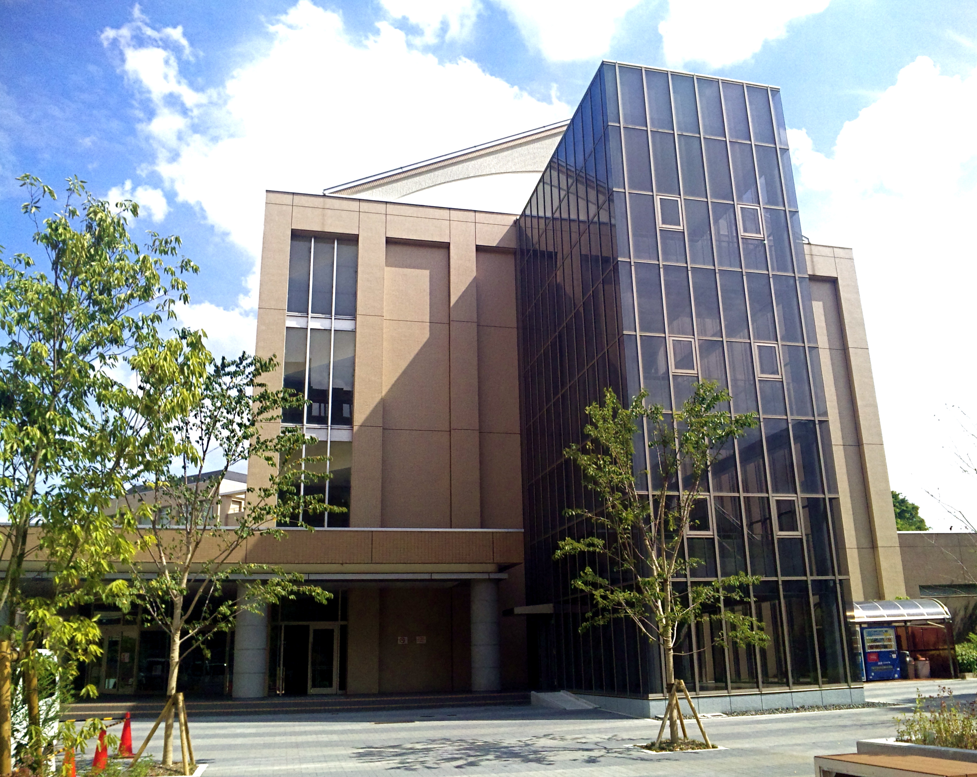 Ad-Seminario (Biwako Kusatsu Campus, Ritsumeikan University, Shiga, Japan)